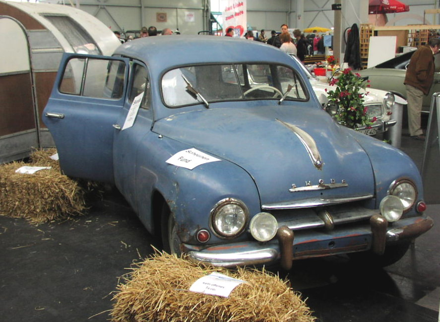 Škoda 1201 Estate